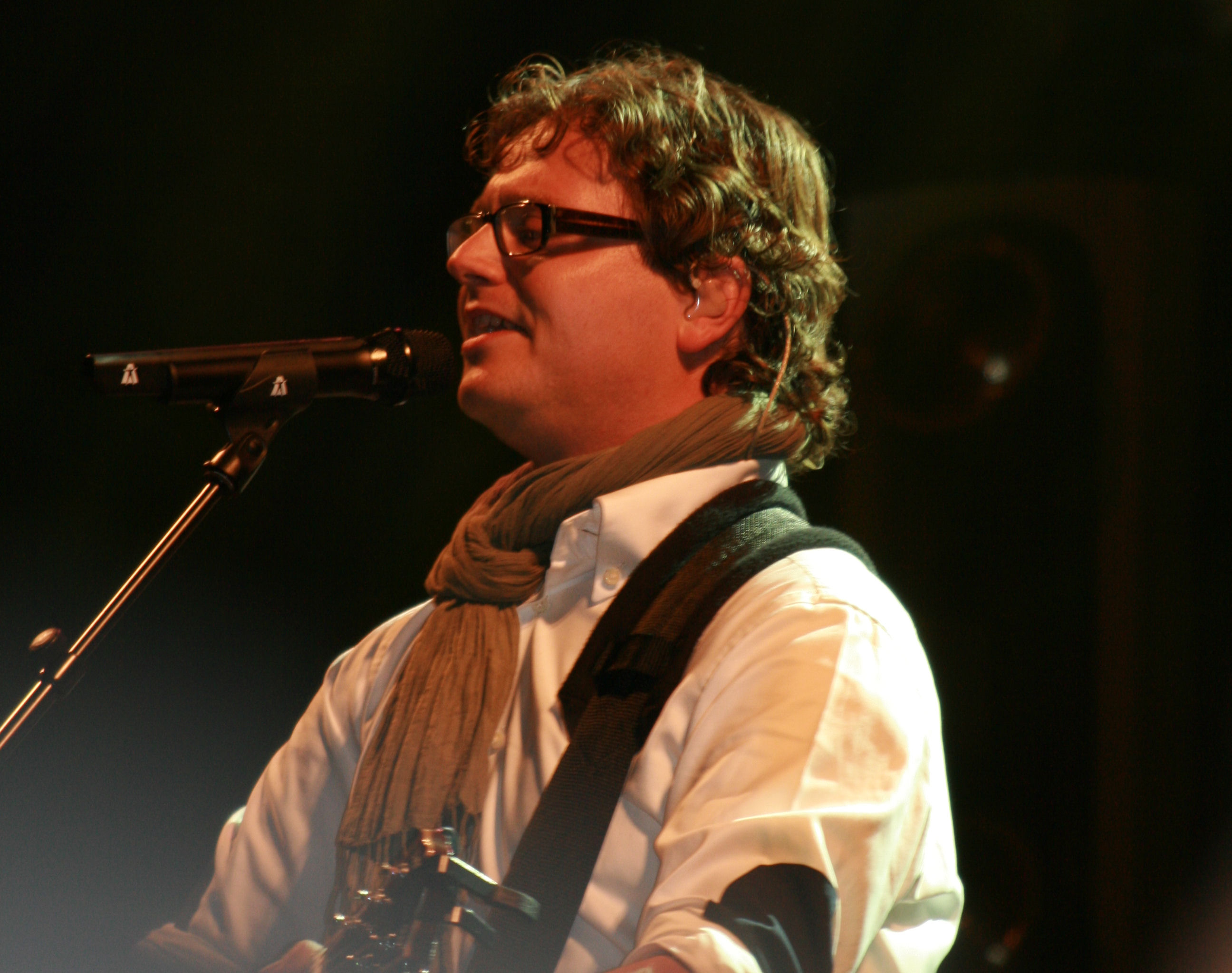 Guus Meeuwis tijdens een concert in Hengelo